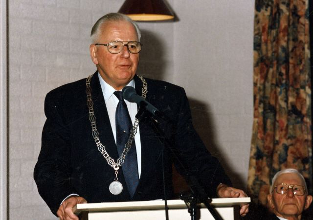 Nieuwerkerk. G. Hokken (burgemeester Bruinisse 1970-1974; waarnemend burgemeester Duiveland 1994-1996).